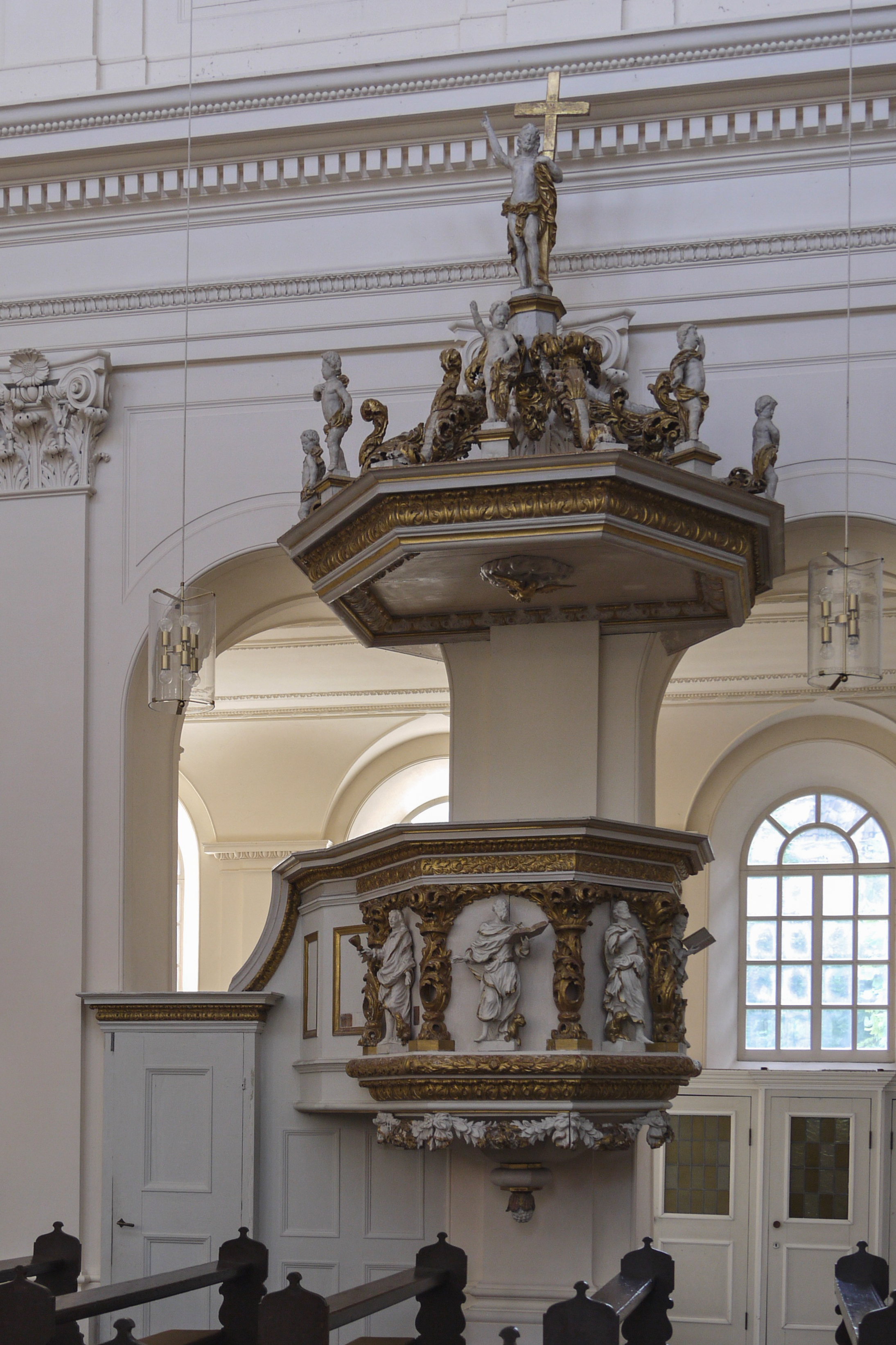 Salzgitter-Ringelheim, Kath. Kirche St. Abdon und Sennen, Kanzel